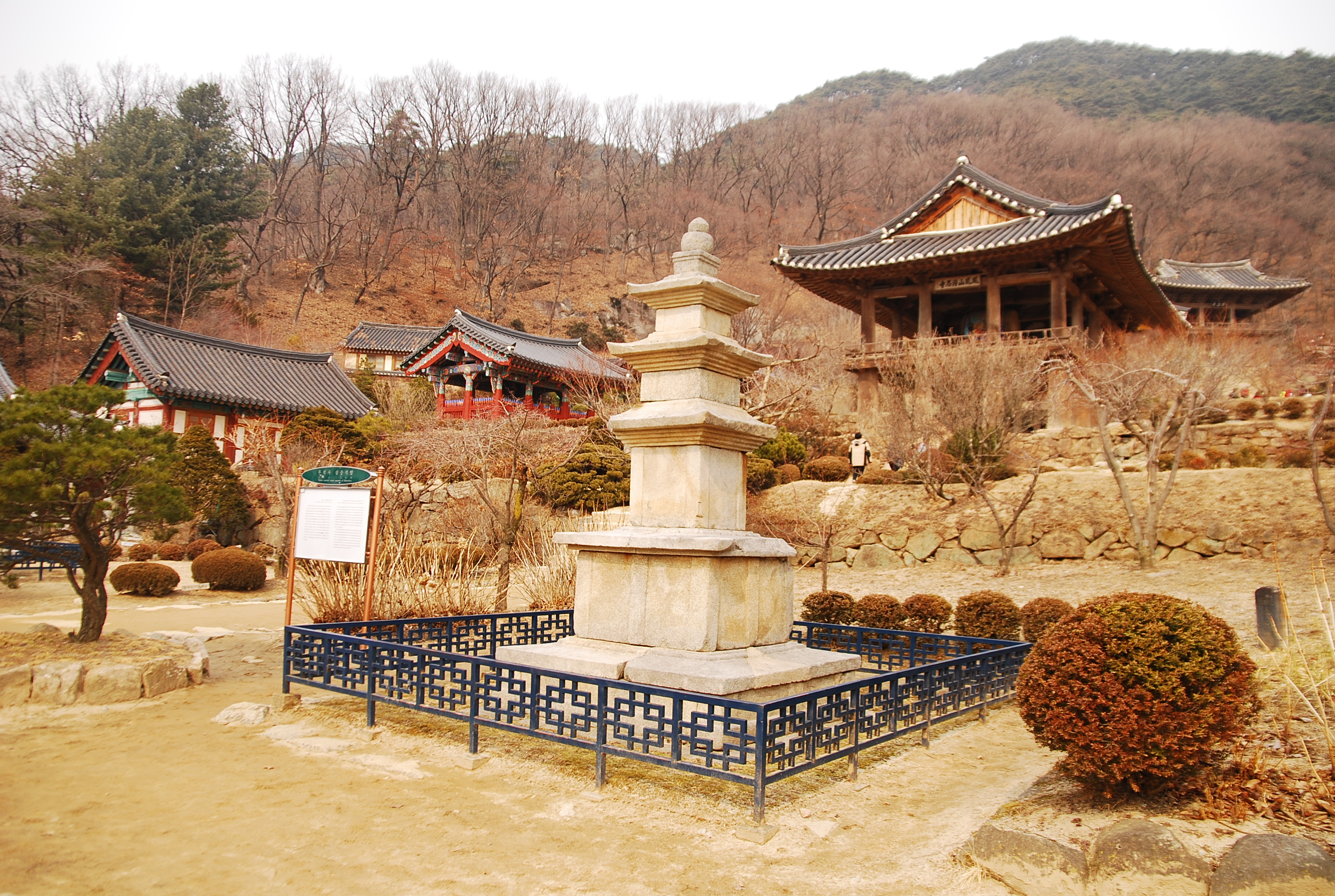 한국어 (조선): 부석사 범종각 앞쪽의 삼층석탑. 무량수전의 동쪽에 있는 석탑과 다른 석탑이다.